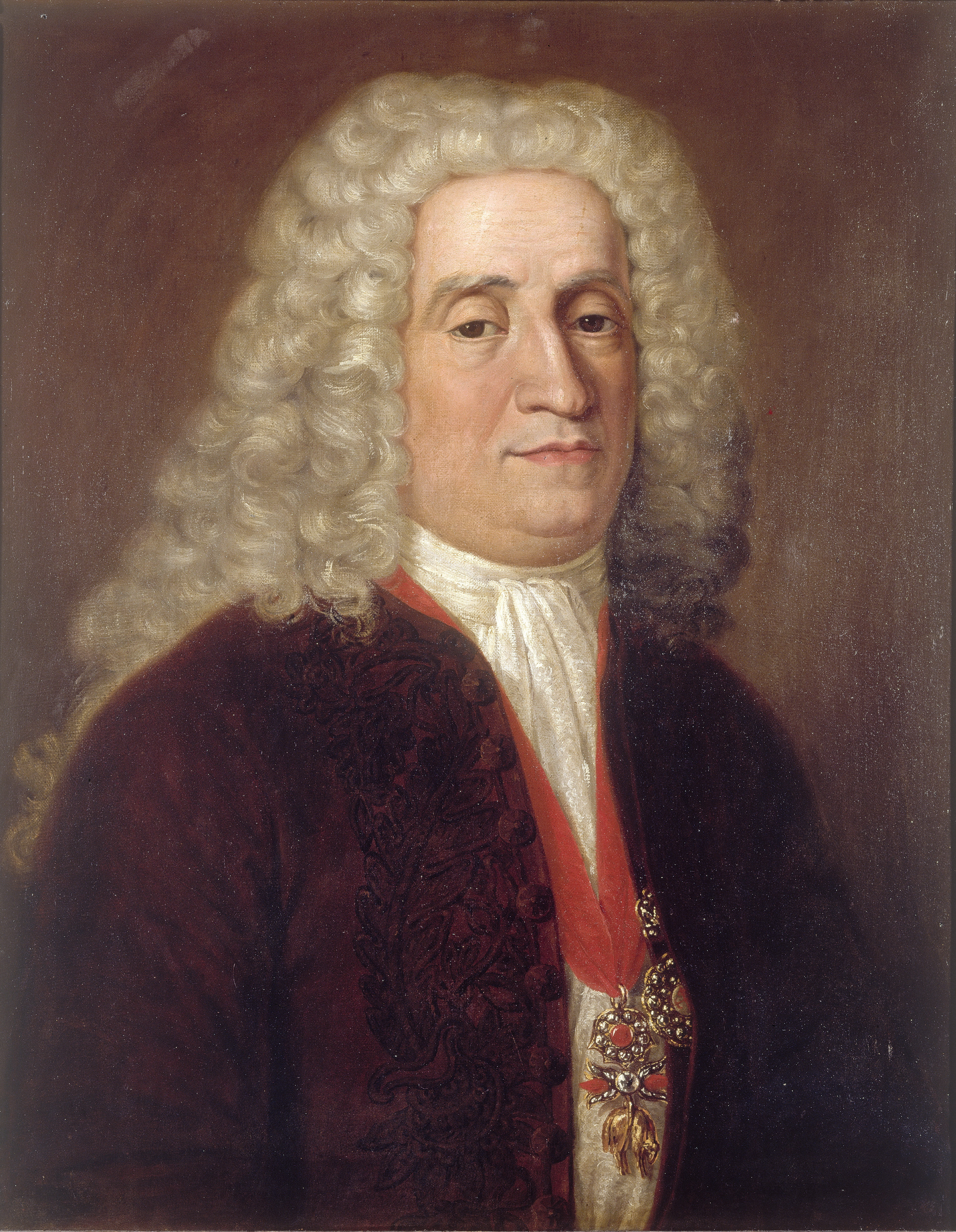 Retrato de José Patiño Rosales (1666-1736), que fue intendente general de la Armada, secretario de Marina e Indias, y también de Guerra y de Hacienda durante el reinado de Felipe V de España. Esta obra es una copia realizada en 1828 por Rafael Tegeo a partir de un original de Jean Ranc.